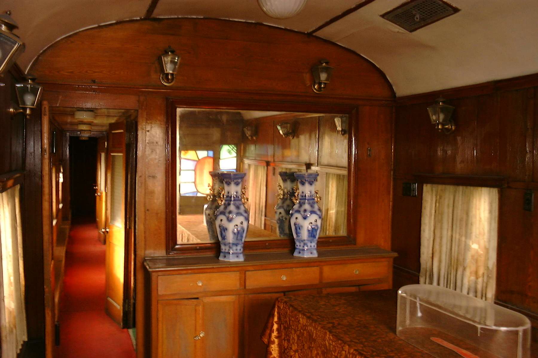 Datong railway museum